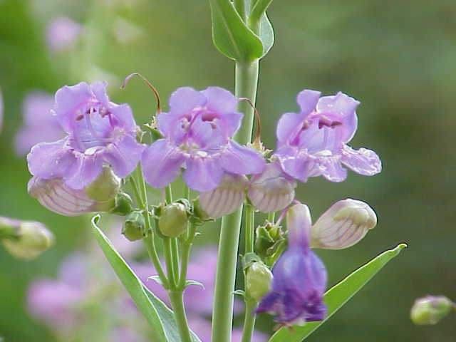 Species: Penstemon speciosus Family: Plantaginaceae Image No. 2